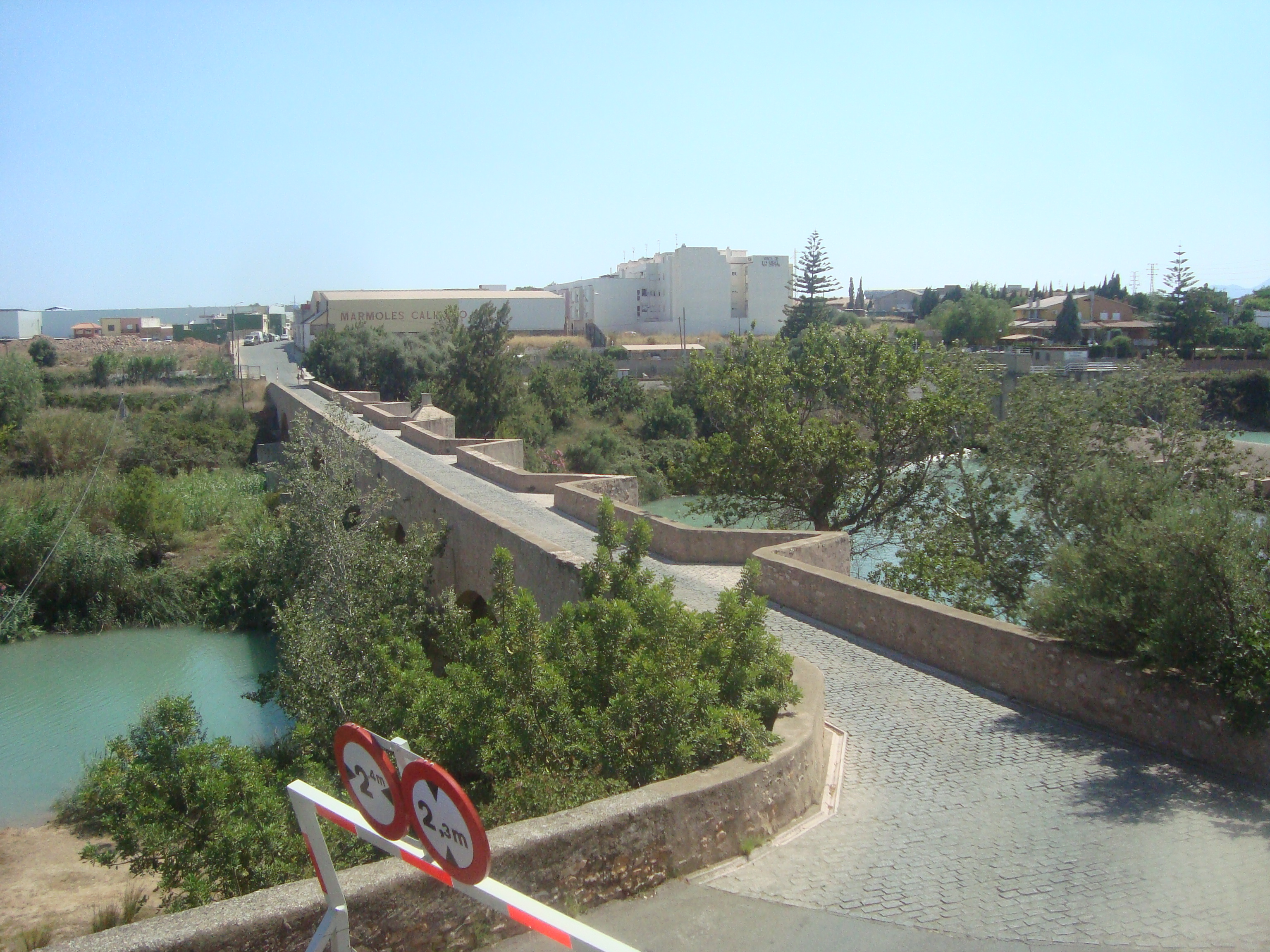 Pont de Santa Quitèria (Almassora i Vila-real)